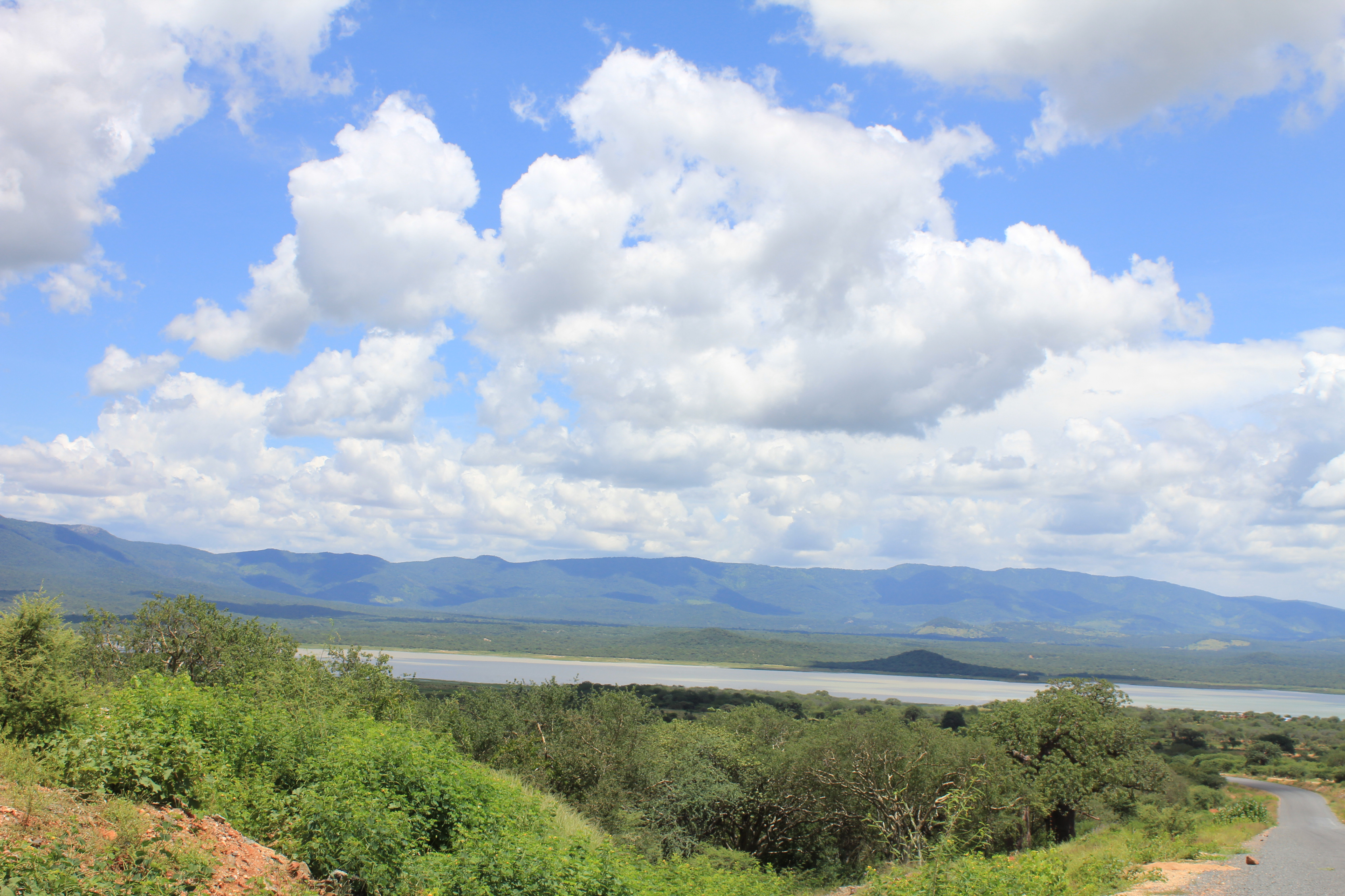 Mtera Reservoir